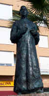 Estàtua de Tarrancon a Borriana.